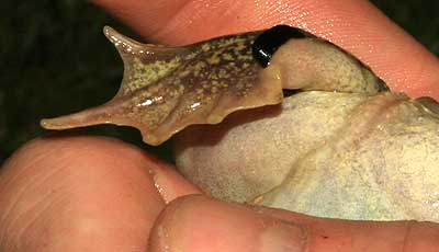 Détail du talon de Pelobates cultripes, montrant le couteau.